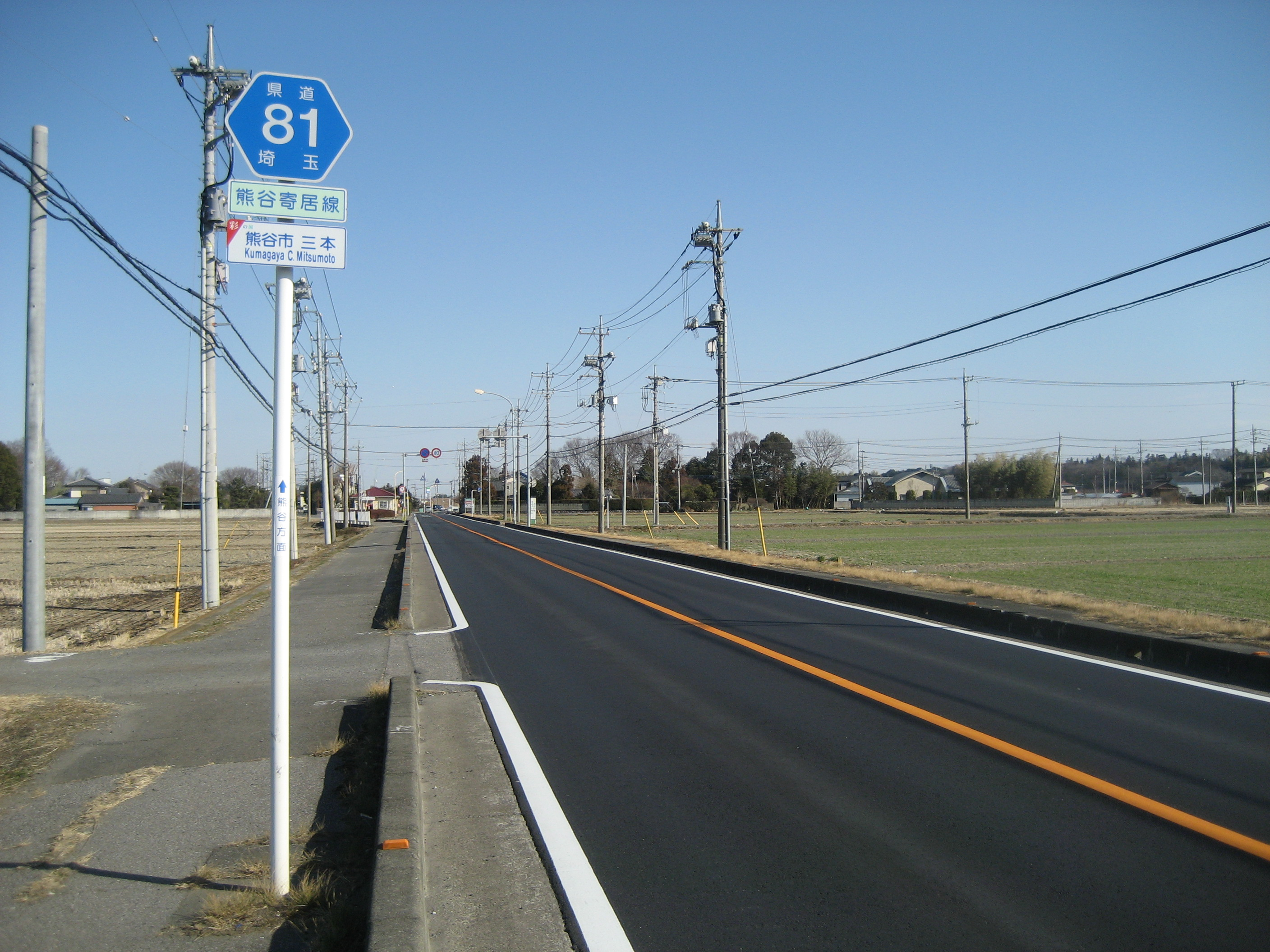 埼玉県道81号線熊谷市三本付近